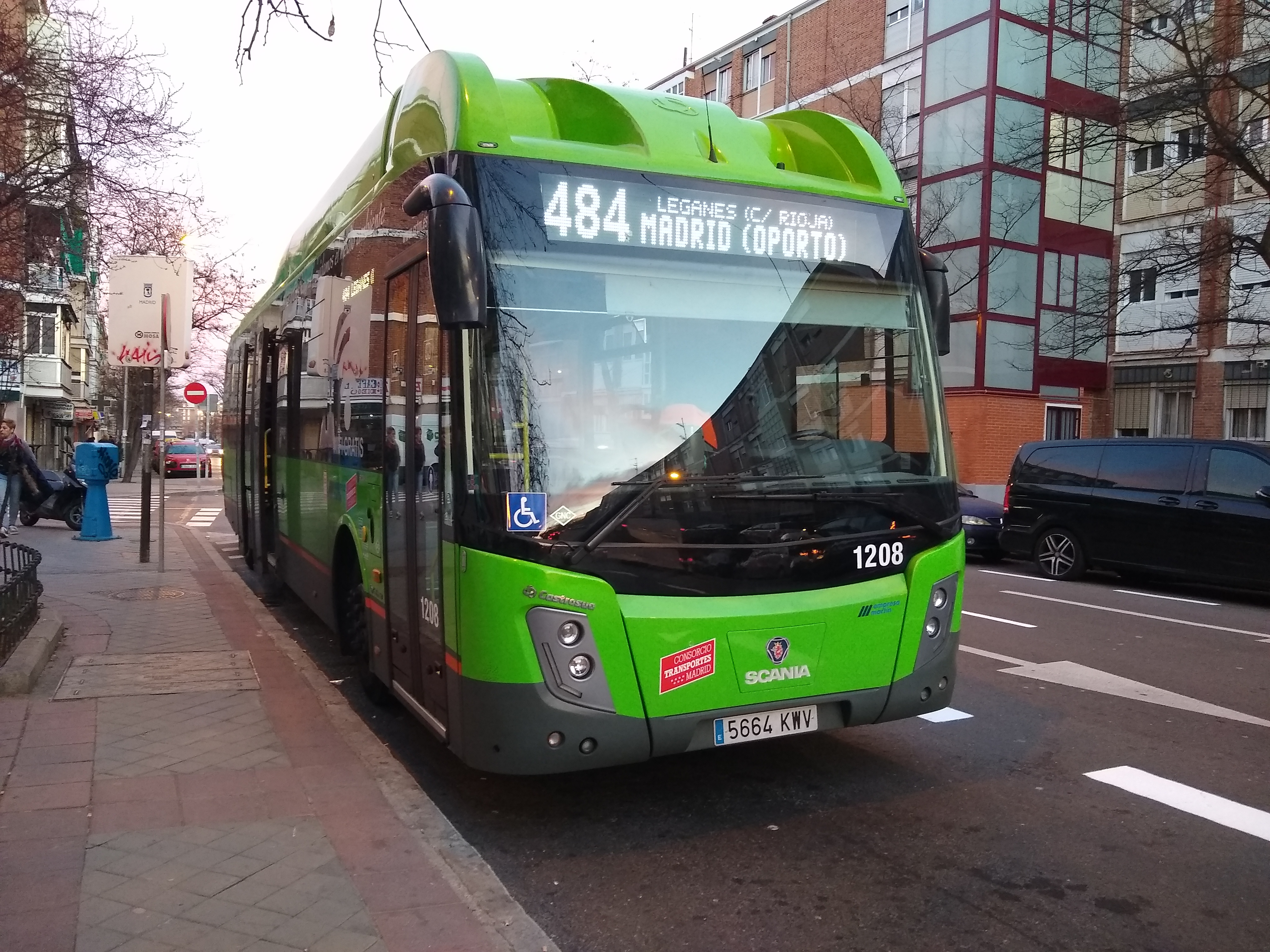 Autobús interurbano de Madrid